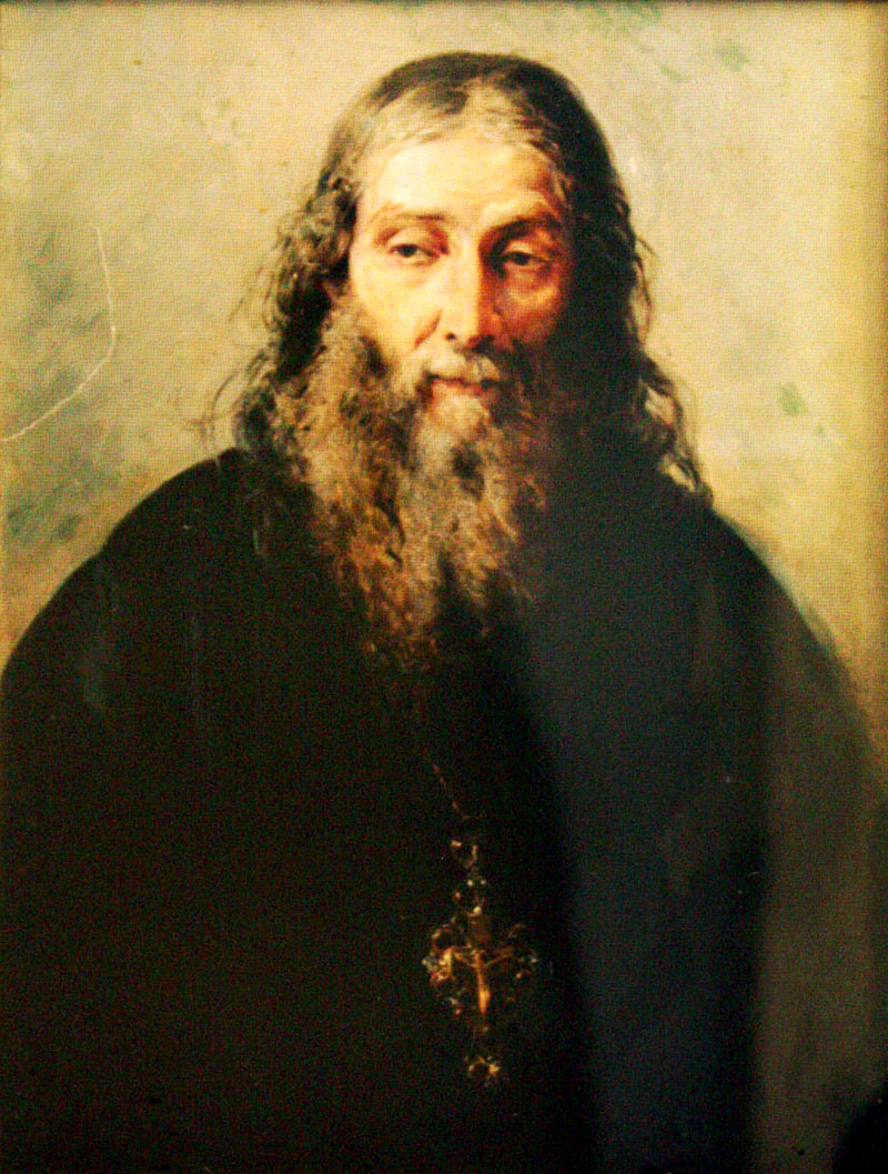 Портрет архимандрита Антонина (Капустина).